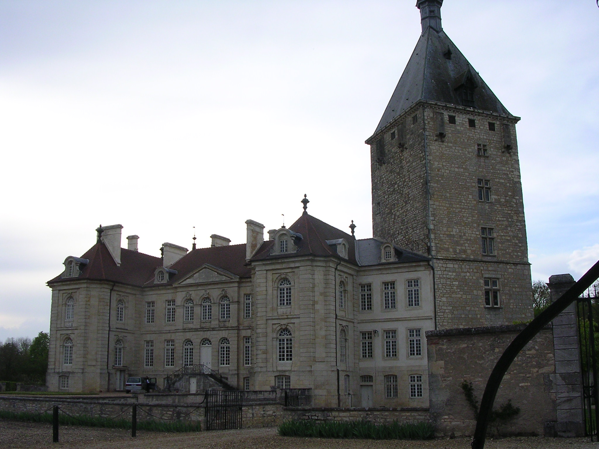 Vue sur le château de Talmay (Côte-d'Or, Bourgogne), (XVIII siècle) avec donjon du XIII siècle